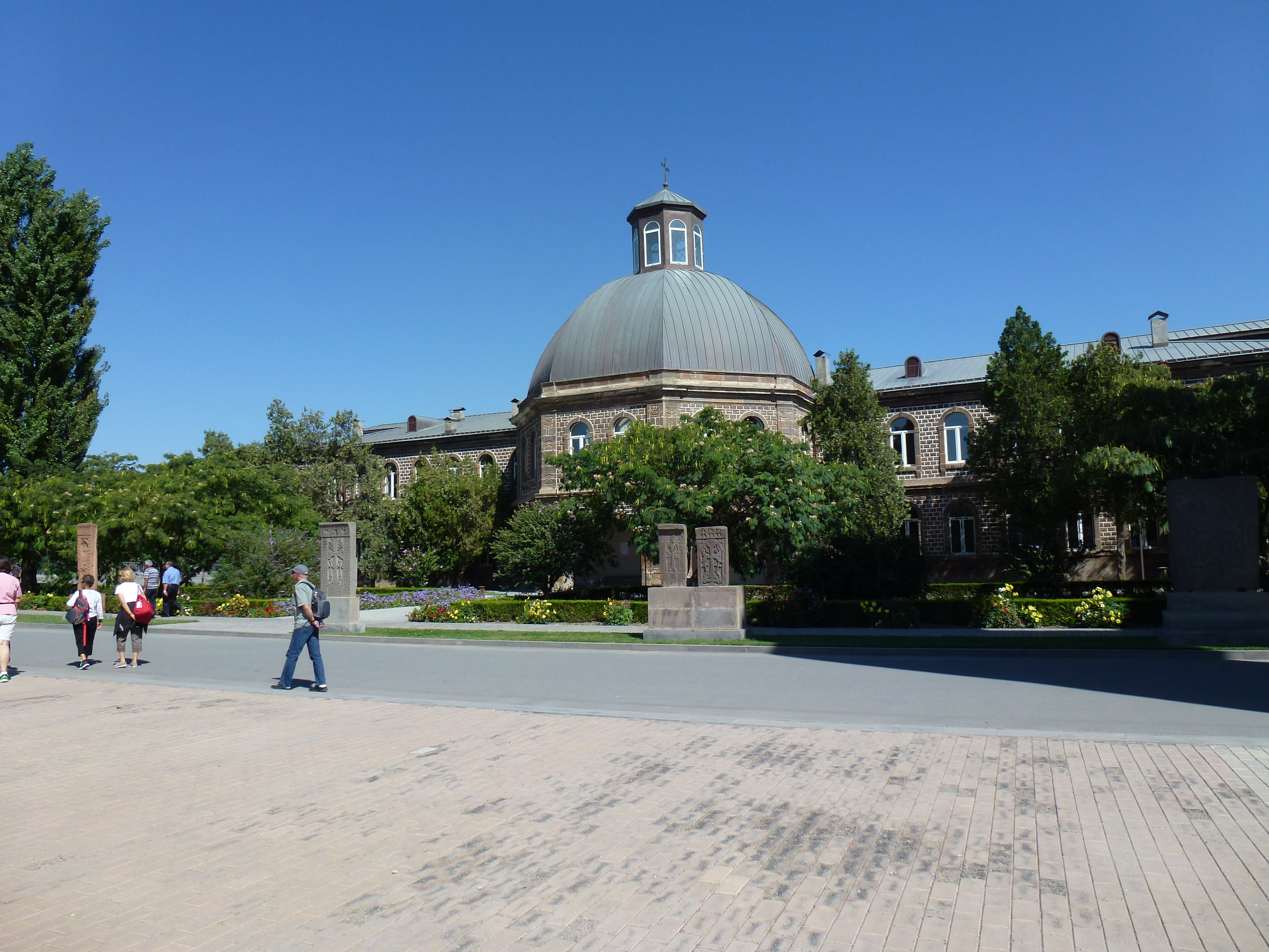 Կառույց Էջմիածնի Մայր տաճարի մոտ 2/14